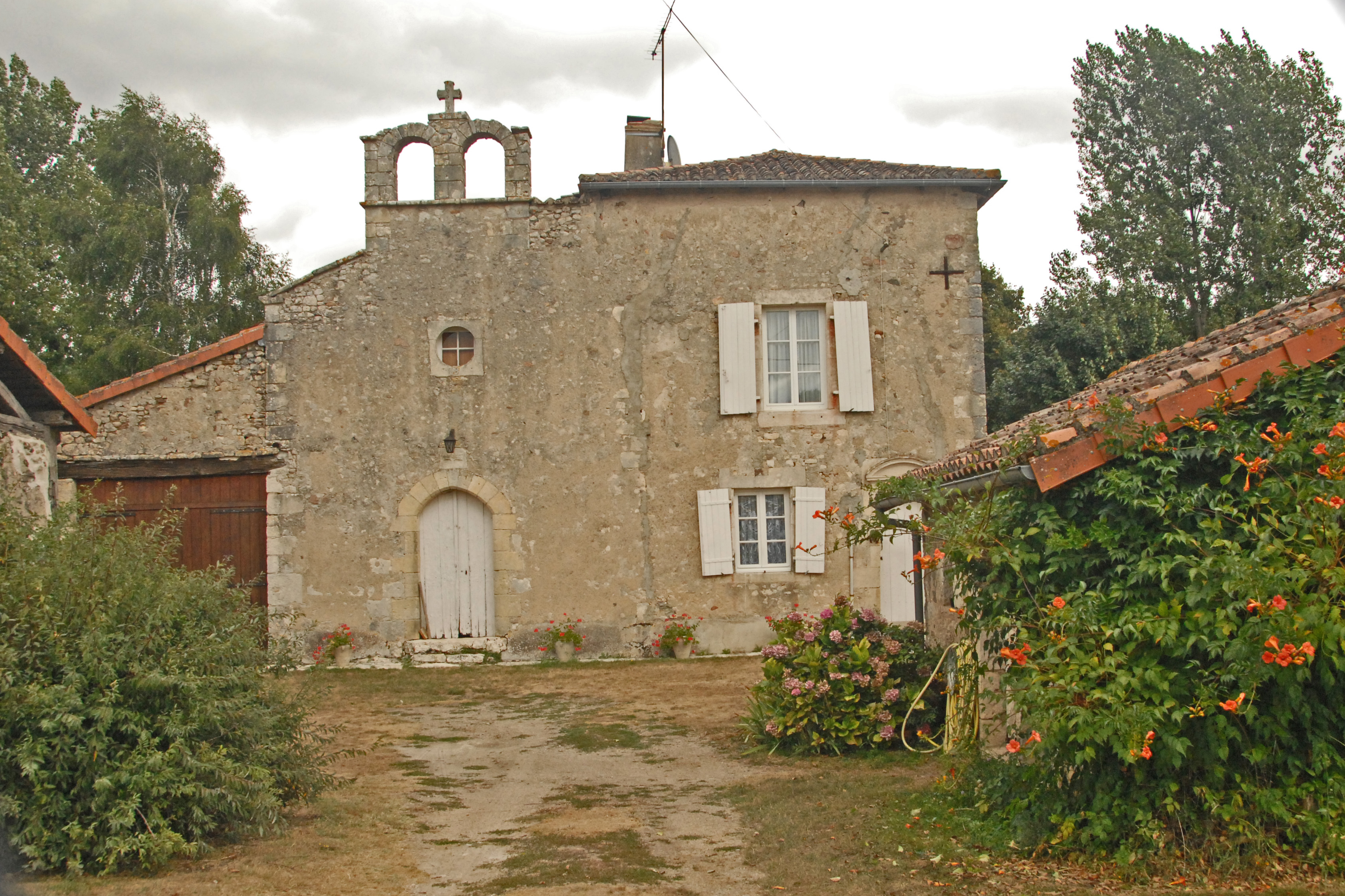 Civaux, ehem. Priorat Loubressac